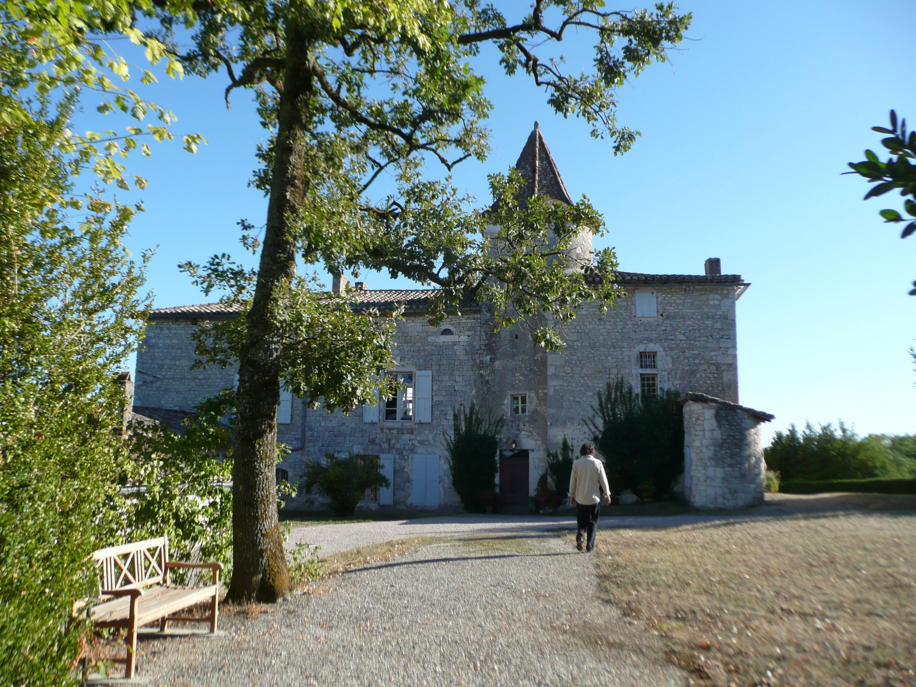 Château-musée du Cayla (ou Musée Eugénie et Maurice de Guérin) à Andillac (France).